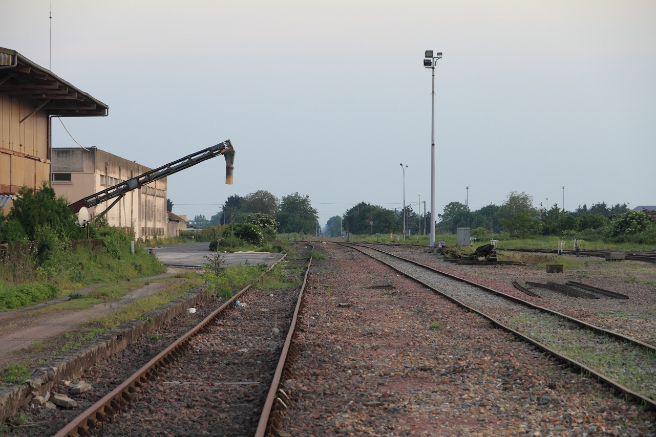 Vue des voies en direction des Aubrais en mai 2012, Centre, France.